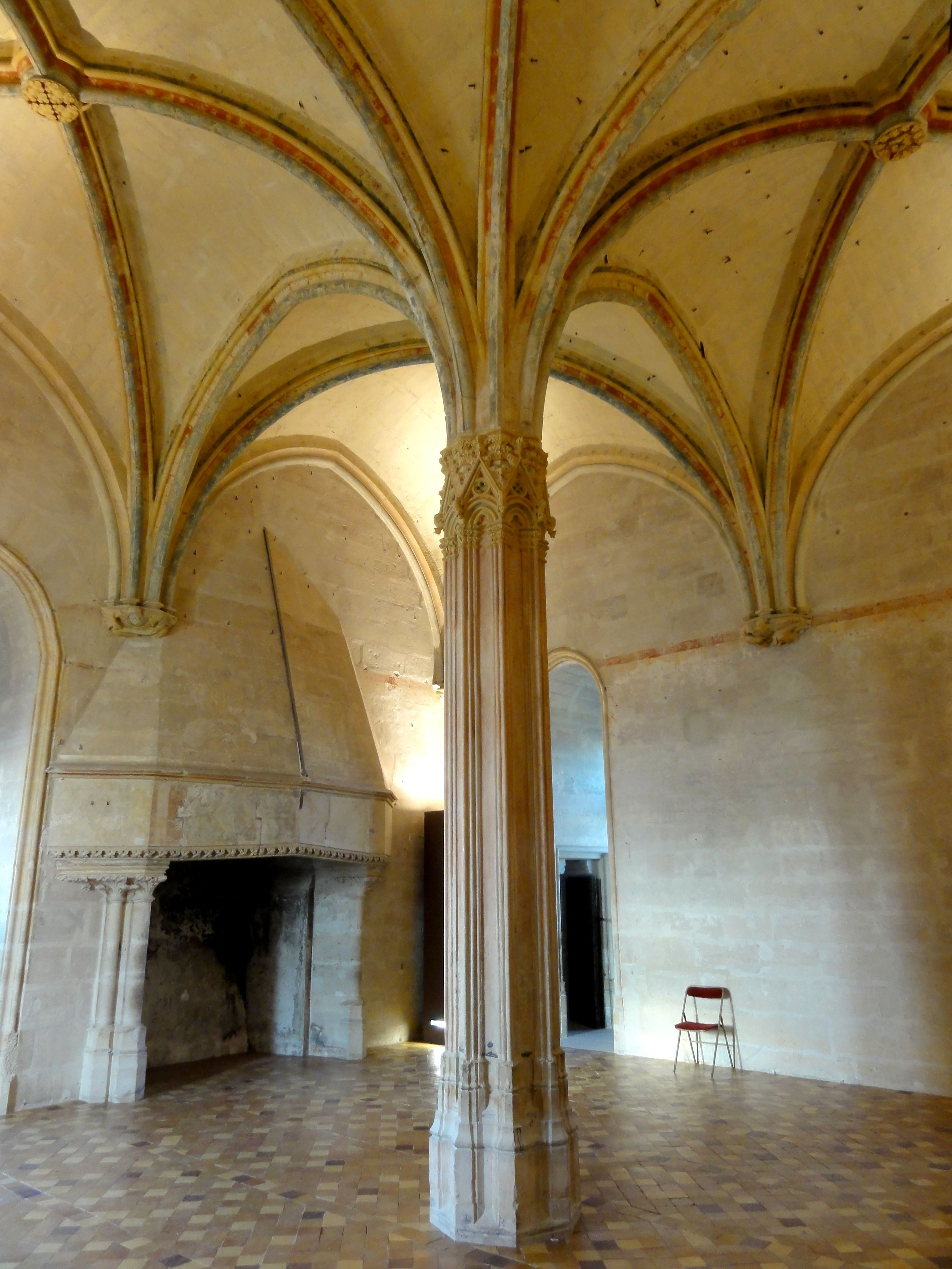 Chambre du Roi.